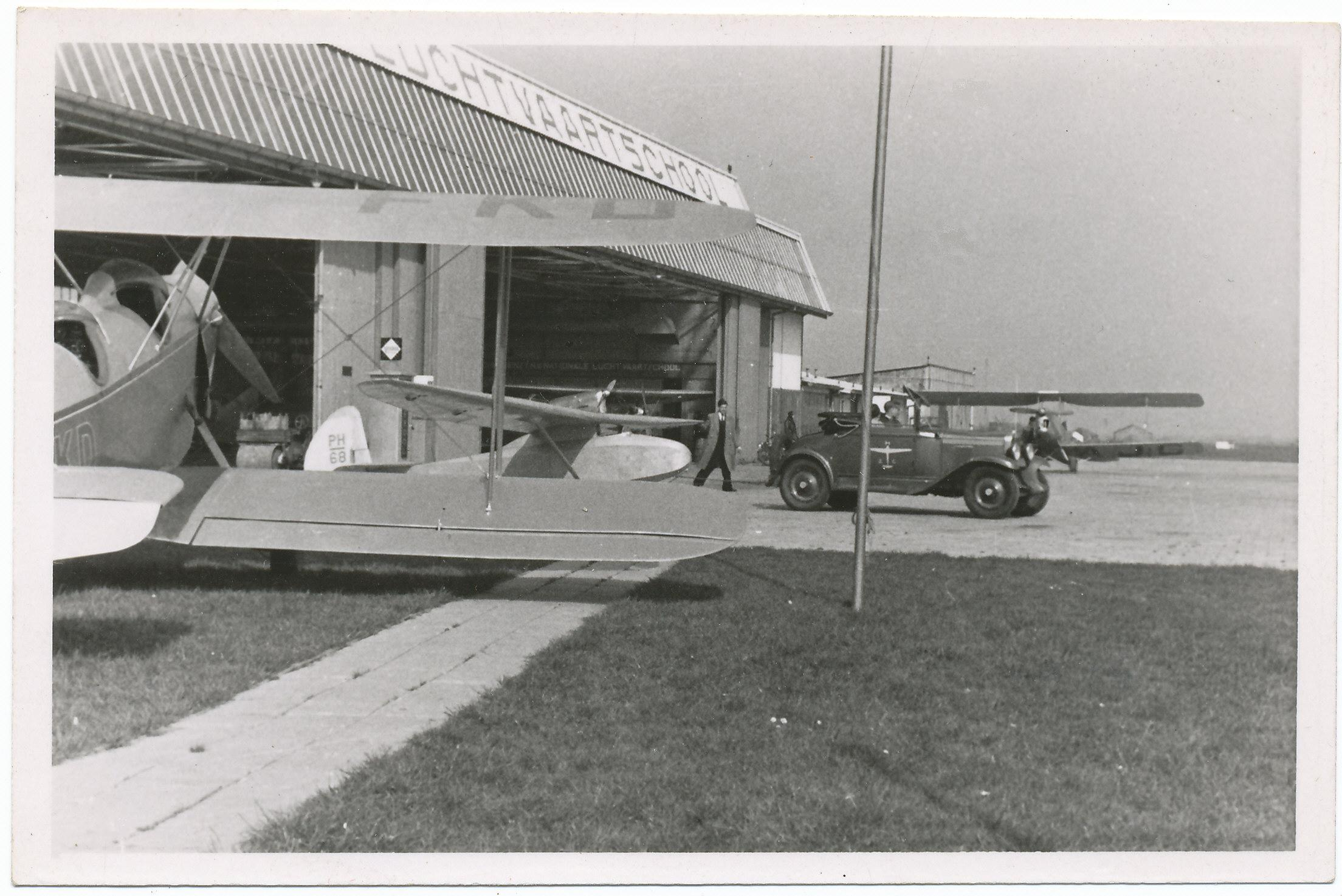 de PH-FKD Koolhoven F.K.46 c/n 4606 op Ypenburg PH-68